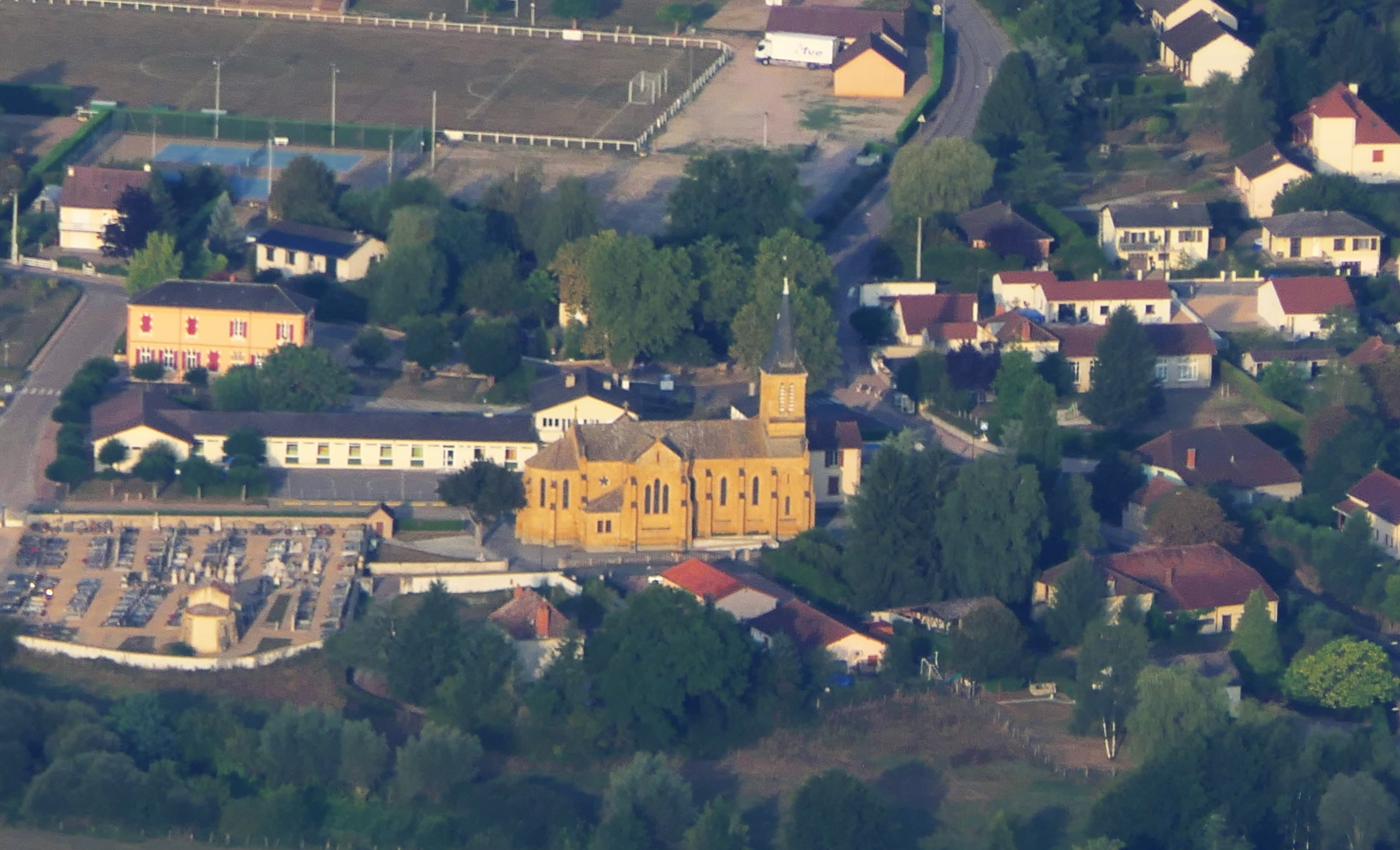 Vitry-en-Charollais, vue aérienne de l'église